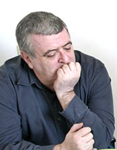 Amnon Dankner